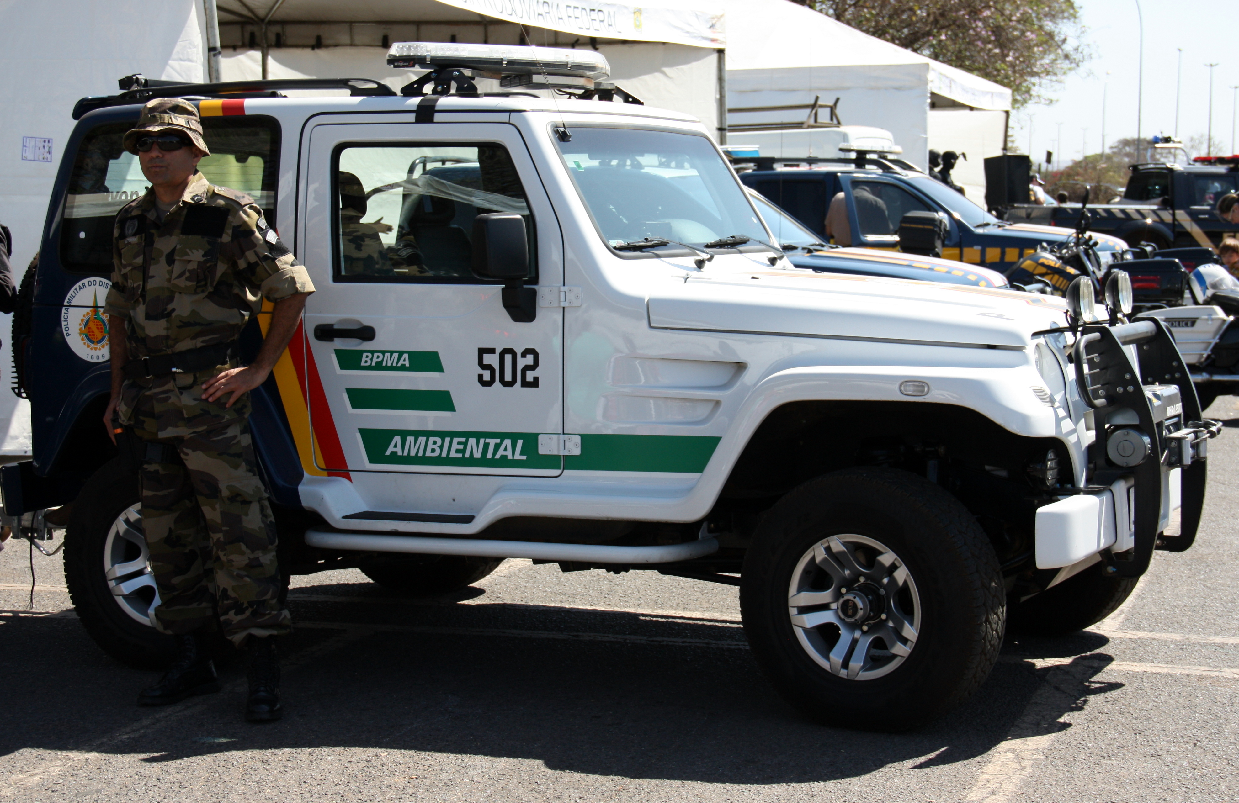 Batalhão de Polícia Militar Ambiental Polícia Militar do Distrito Federal